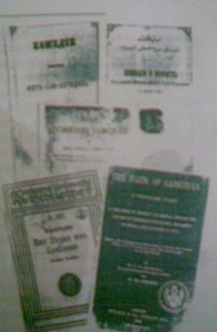 переводы произведений М. Ф. Ахундова на языки Европы